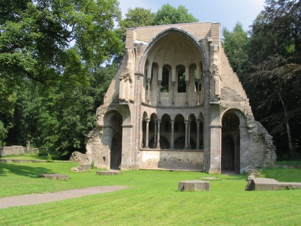 Chorruine des Kloster Heisterbach